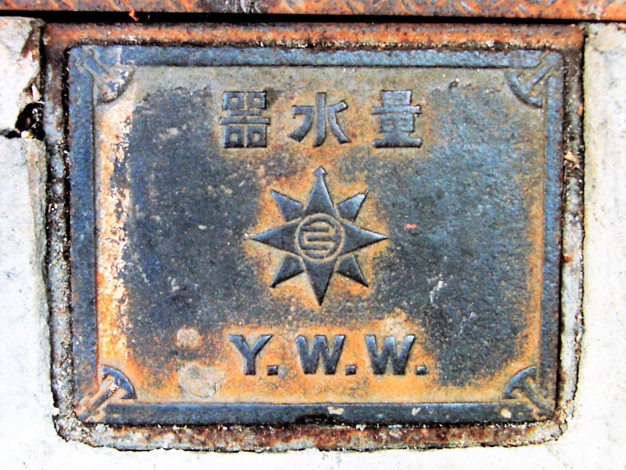 横須賀市水道局量水器蓋